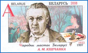 Оригинальная марка "75 лет со дня рождения Кищенко А. М. ", подготовленная ИЦ "Марка" РУП "Белпочта". 25 июня 2008 года. Народный художник Беларуси. А. М. Кищенко. 1933-1997 — на бел. языке, портрет, картина.